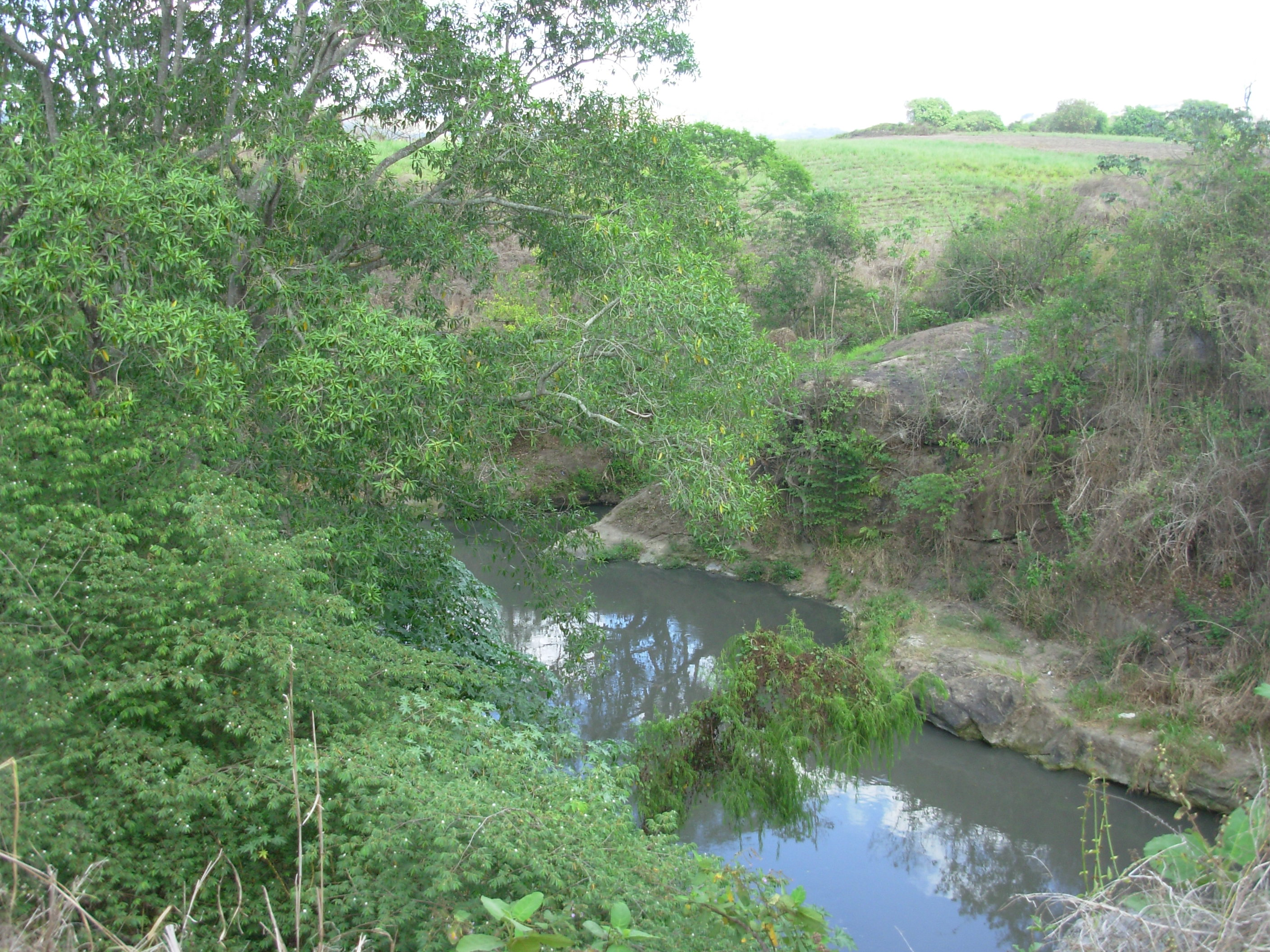 Rio Sucio, carretera San matias-Quezaltepeque